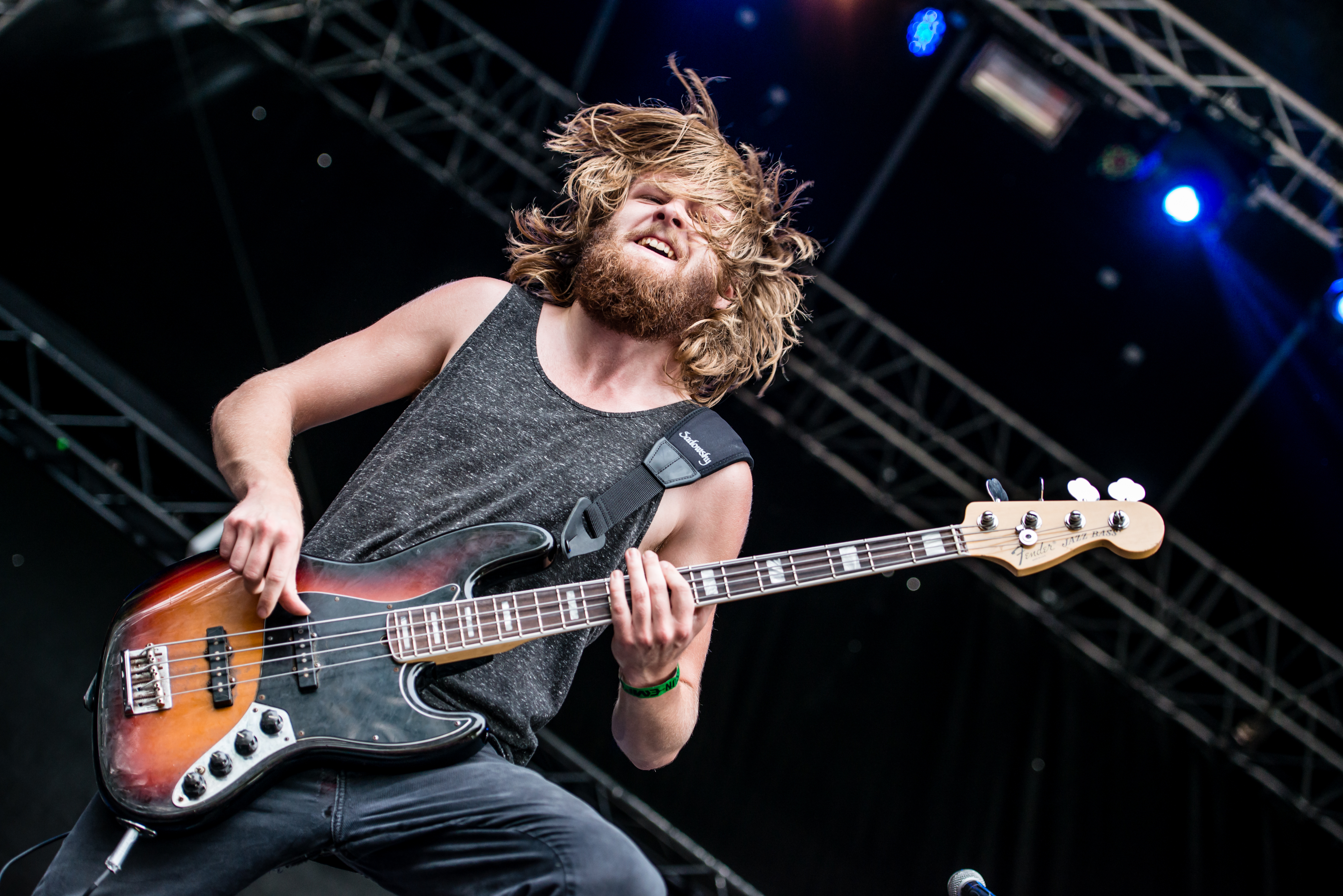 'Turock Open Air 2015; Essen': 'The Vintage Caravan'